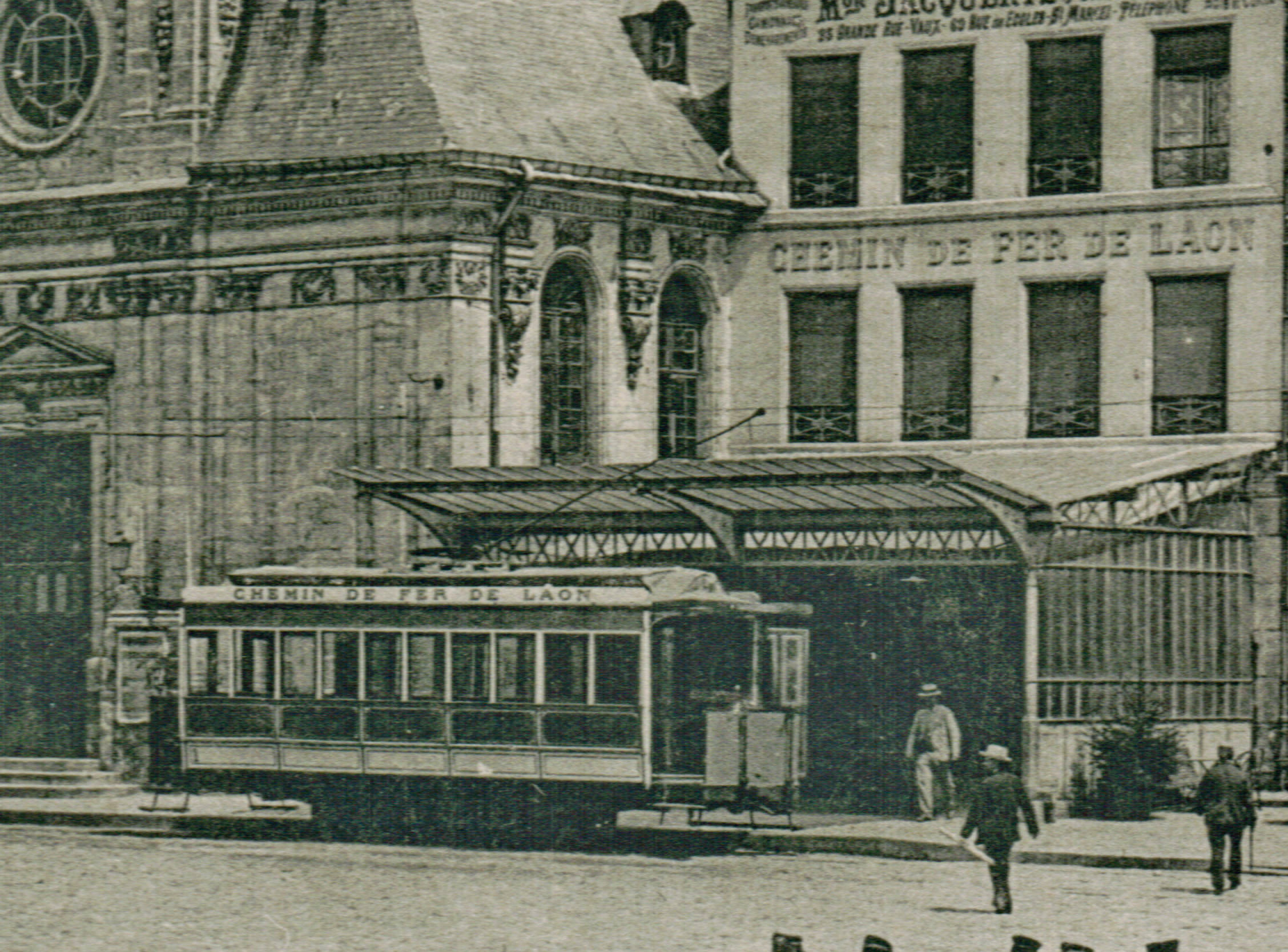 Détail d'une carte postale ancienne éditée par Barnaud à Laon, n°49 LAON : Place de l'Hôtel-de-Ville Détail sur la gare haute du chemin de fer de Laon, à crémaillère, qui reliait la Gare de Laon à la ville haute.